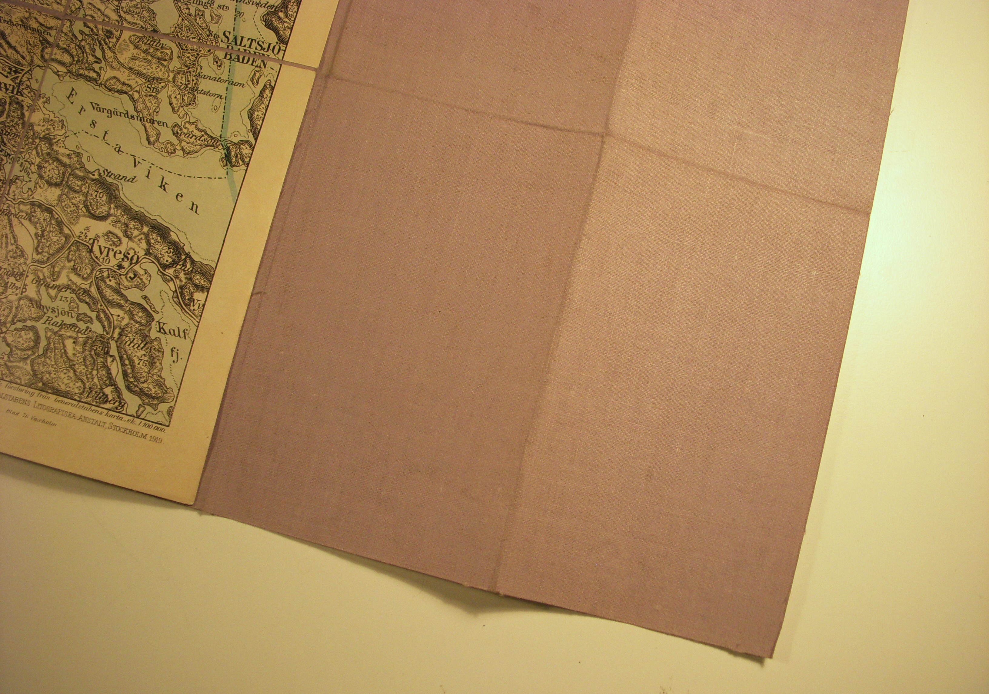 Lärft på baksidan av en karta för att stabilisera denna